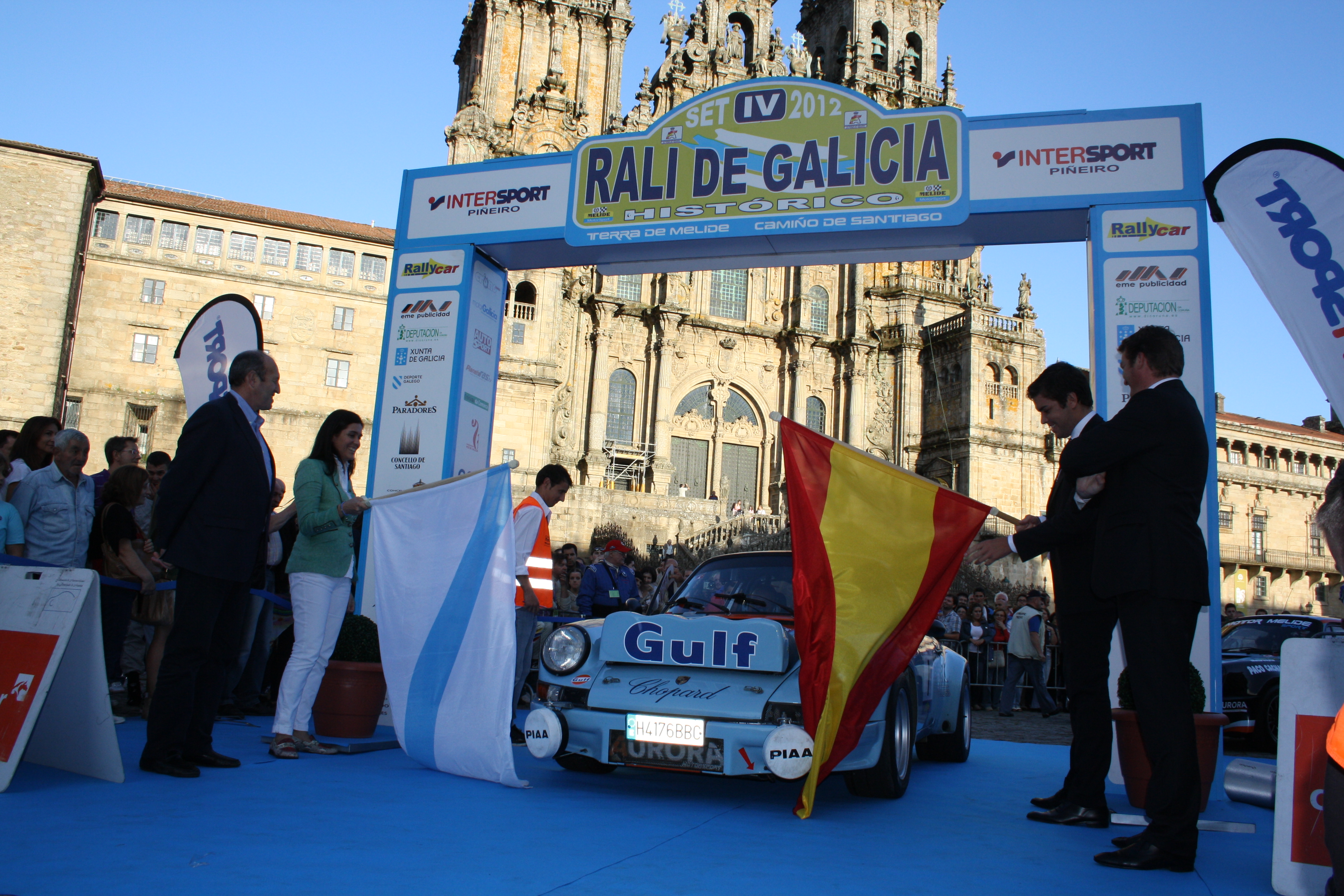 Rally de Galicia Histórico 2012